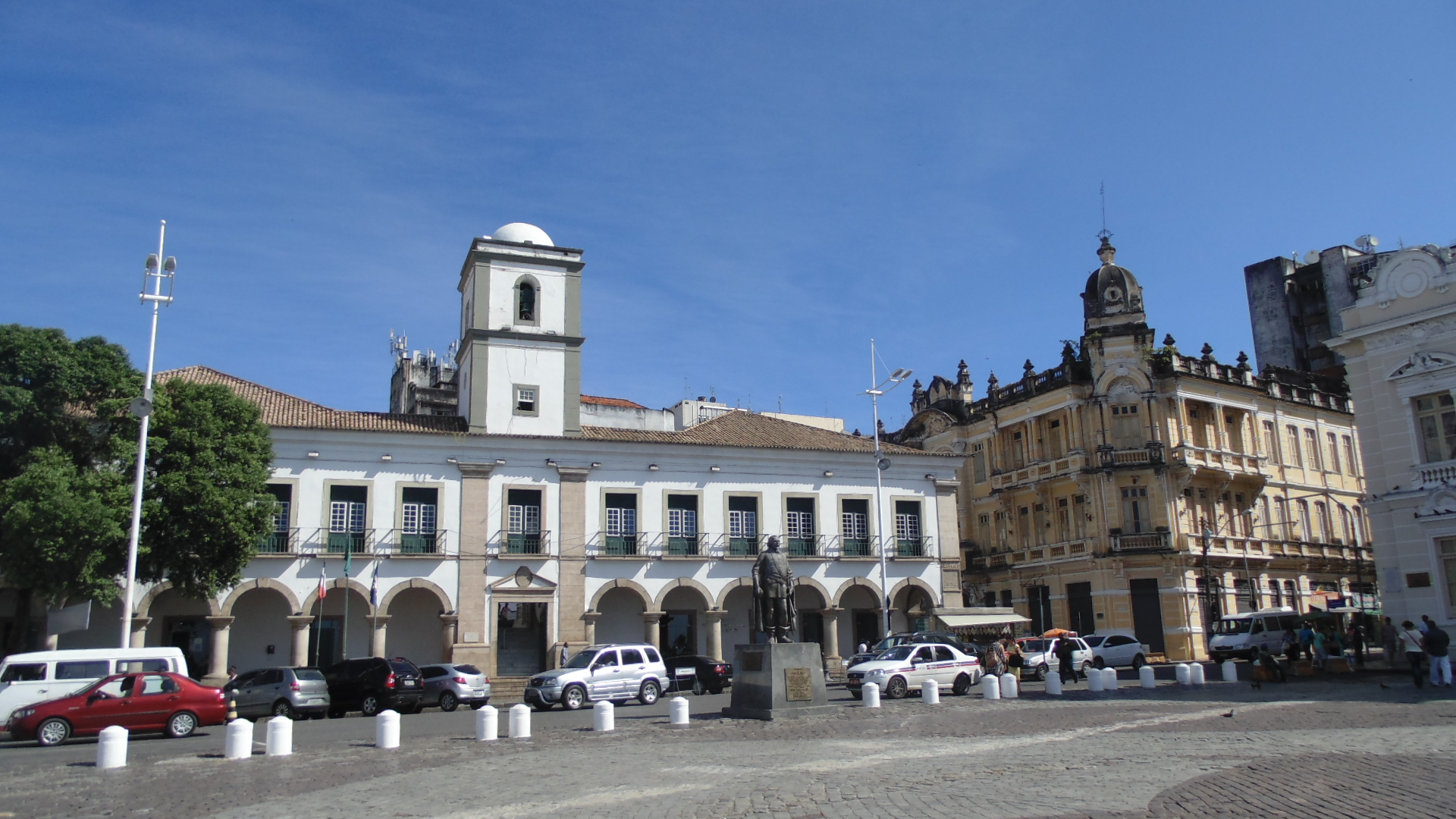 Salvador-BA